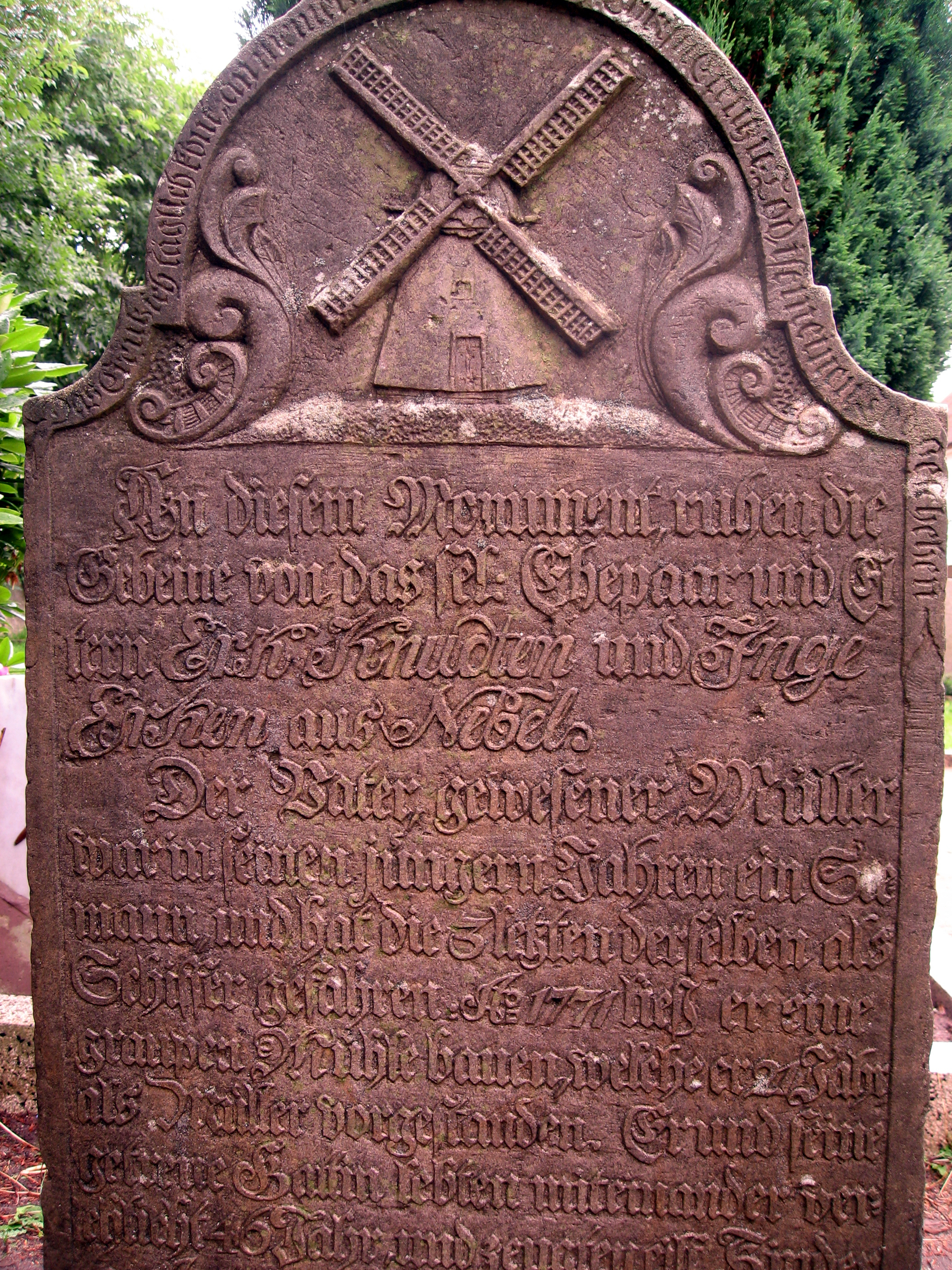 Grabstein vom Ehepaar Er(i)k Knudt(s)en und Inge Erk(s)en auf dem Friedhof in Nebel(Amrum) Seefahrer und späterer Erbauer und Müller der ersten Mühle auf Amrum